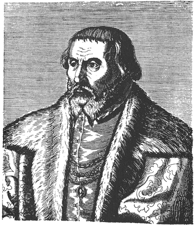 Pierandrea Mattioli (1501-1557)